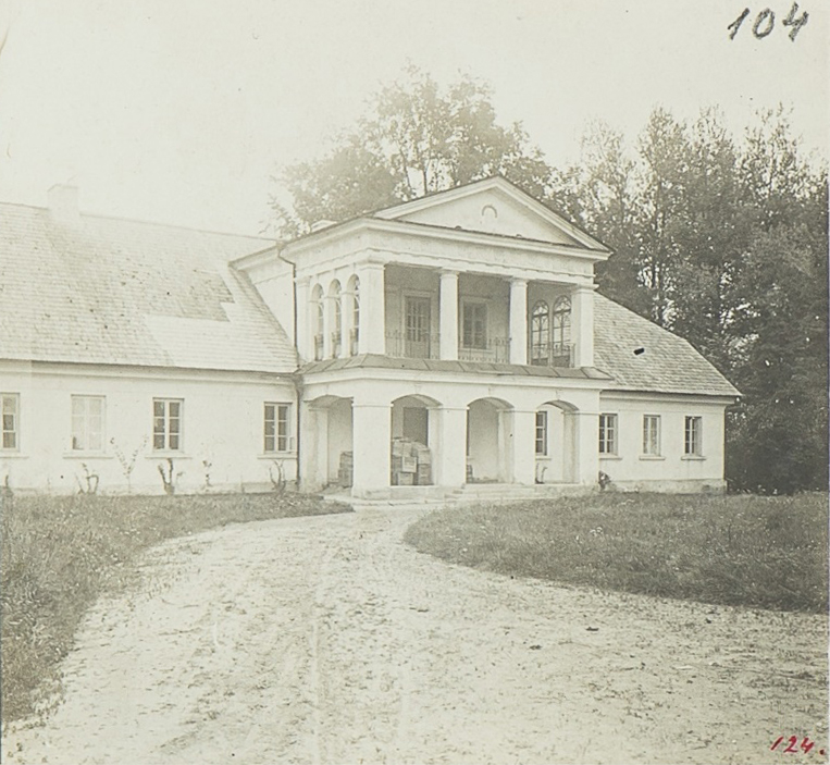 Беларуская (тарашкевіца): Гнезна (Hniezna), сядзіба Тарасовічаў (Tarasovič)